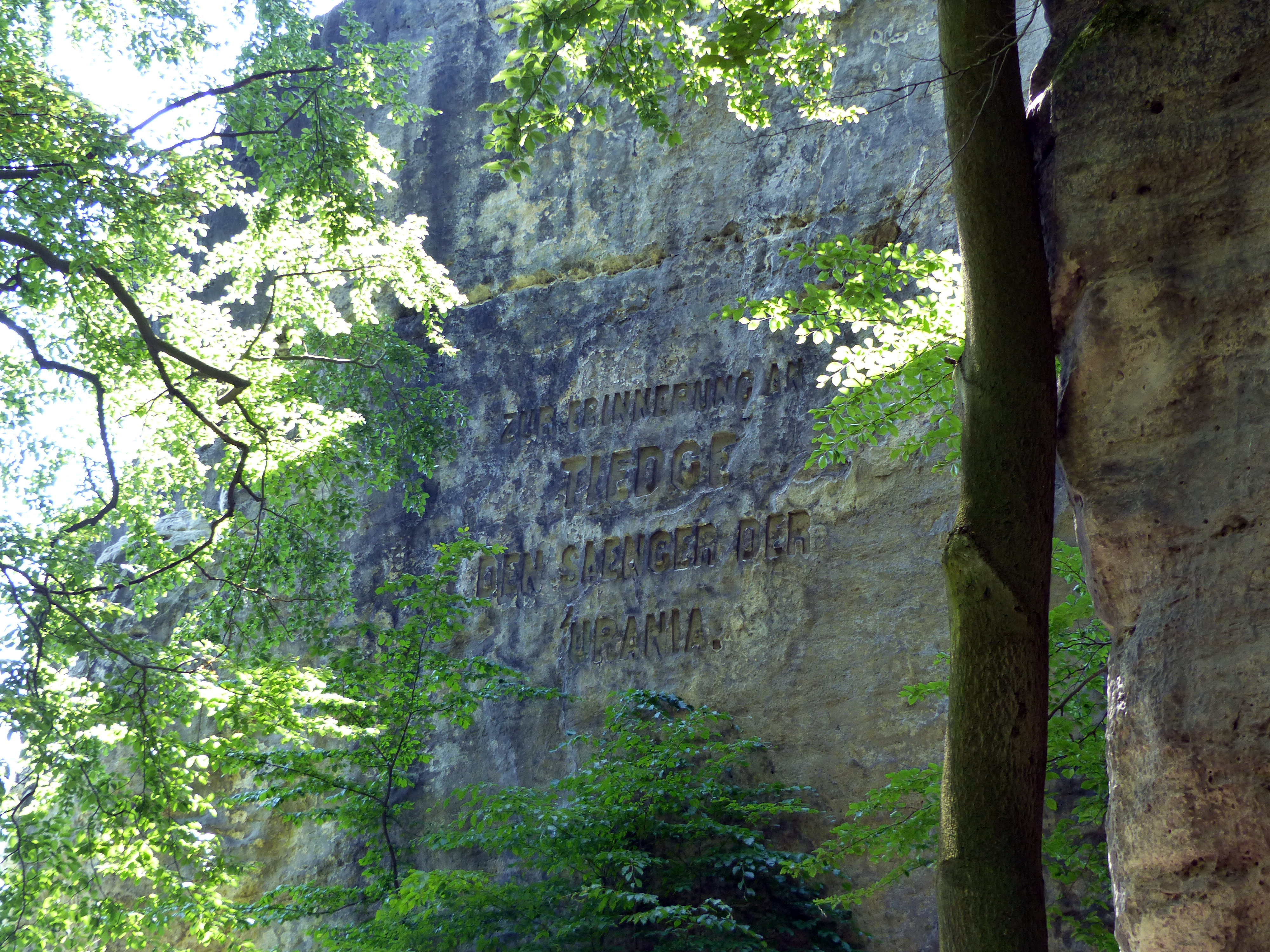 Tiedgestein an der Bastei Bastei im Nationalpark Sächsische Schweiz. Inschrift „Zur Erinnerung an Tiedge, den Sänger der Urania“